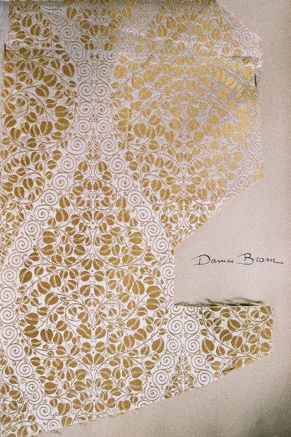 Zijdedamast A.E.Grossé circa 1910-1915